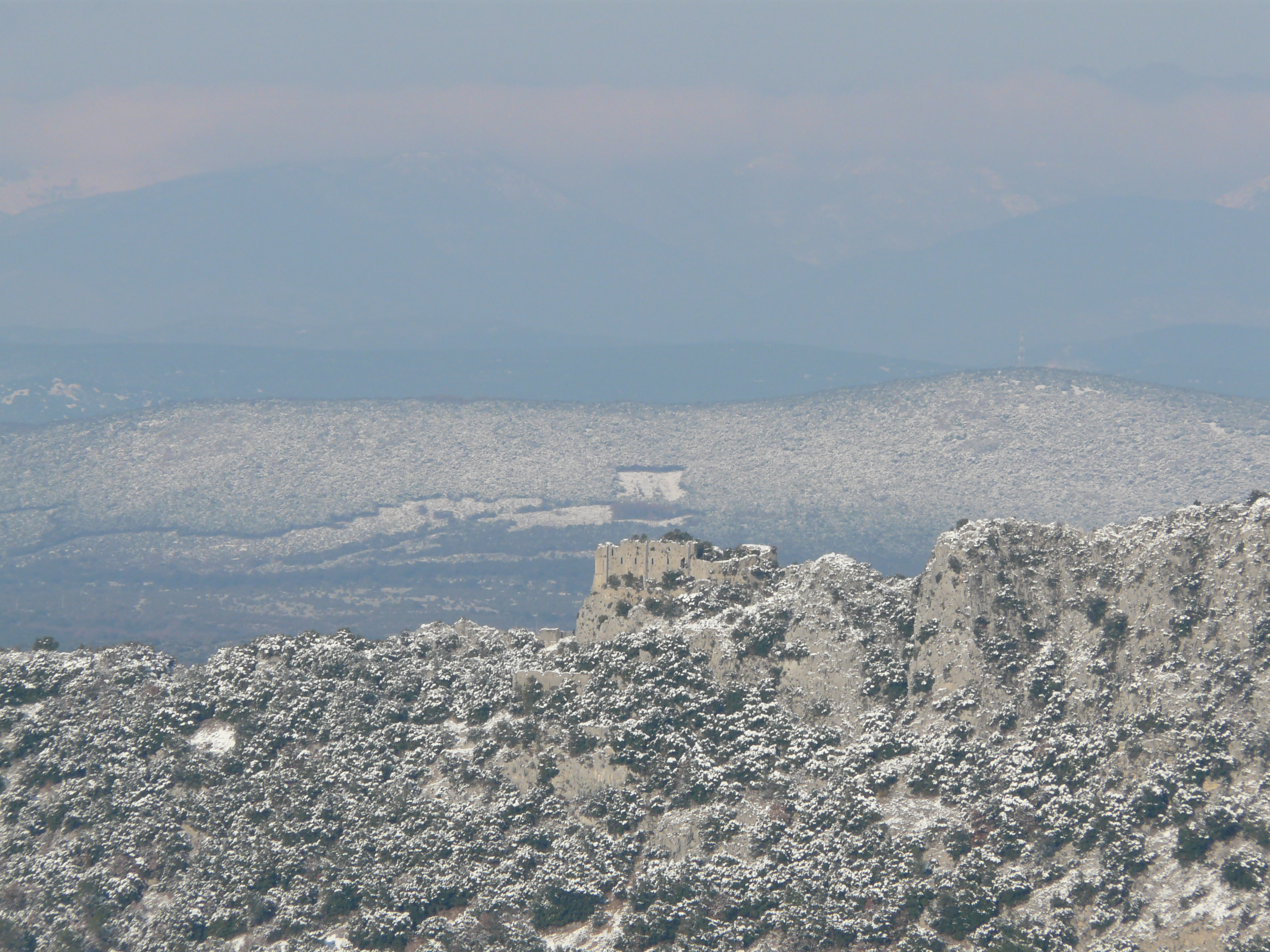 Château de la Roquette vu du château de Montferrand. .